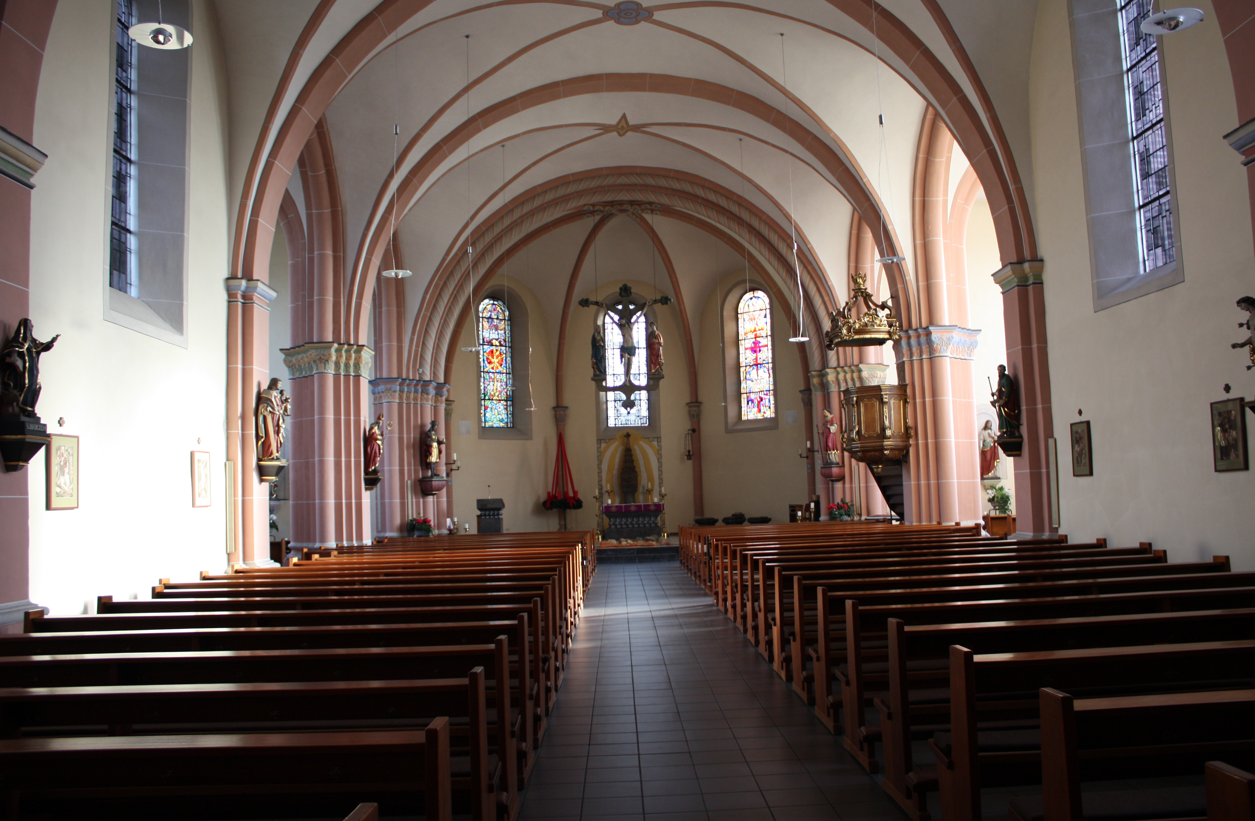 Erftstadt-Erp, Pfarrkirche St.Pantaleon